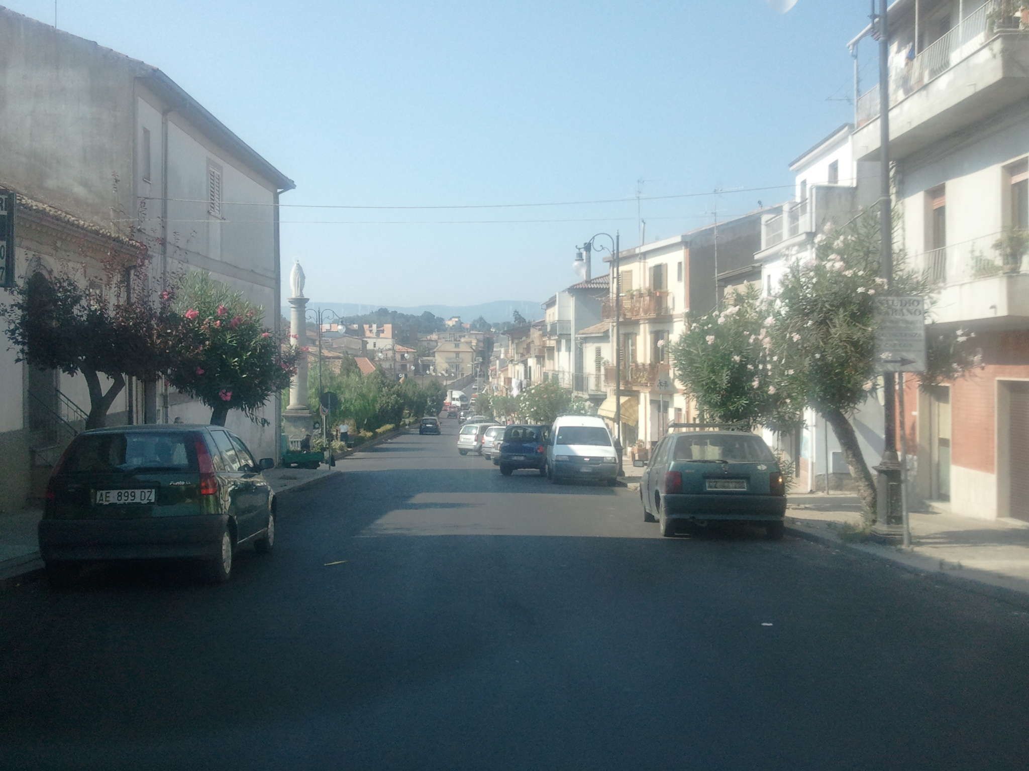 Hauptstraße durch den Ort Borgia, CZ, Kalabrien, Italien